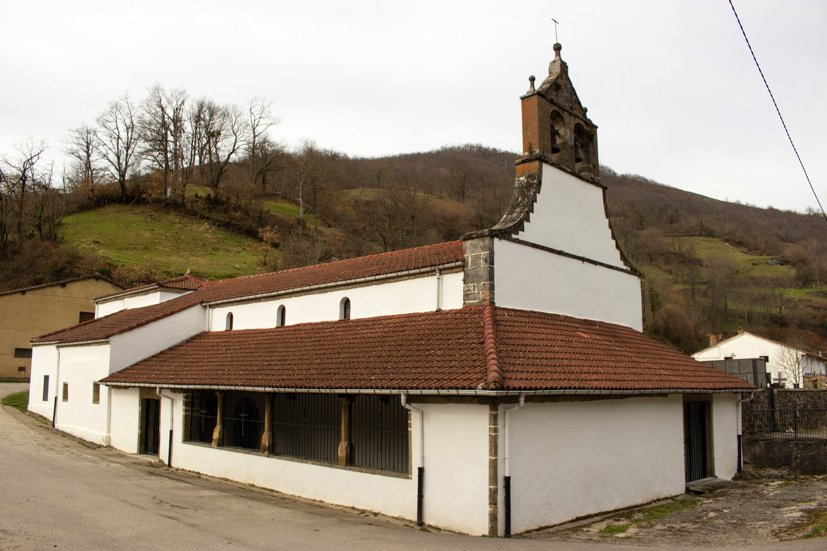 Iglesia parroquial de Casomera, Aller, Asturias